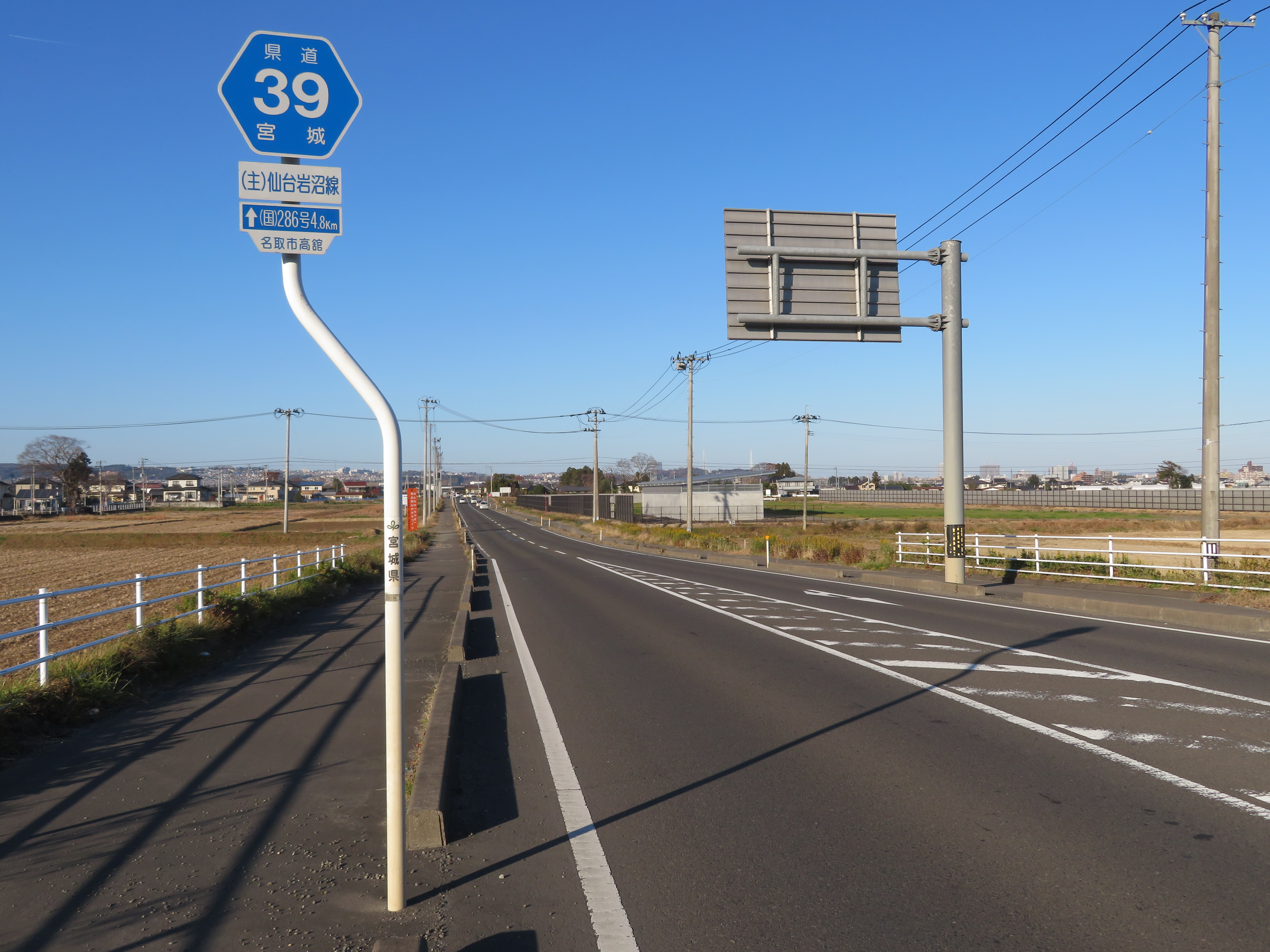 宮城県道258号線名取市高舘付近（国道286号線方面を撮影） Canon PowerShot SX720 HS